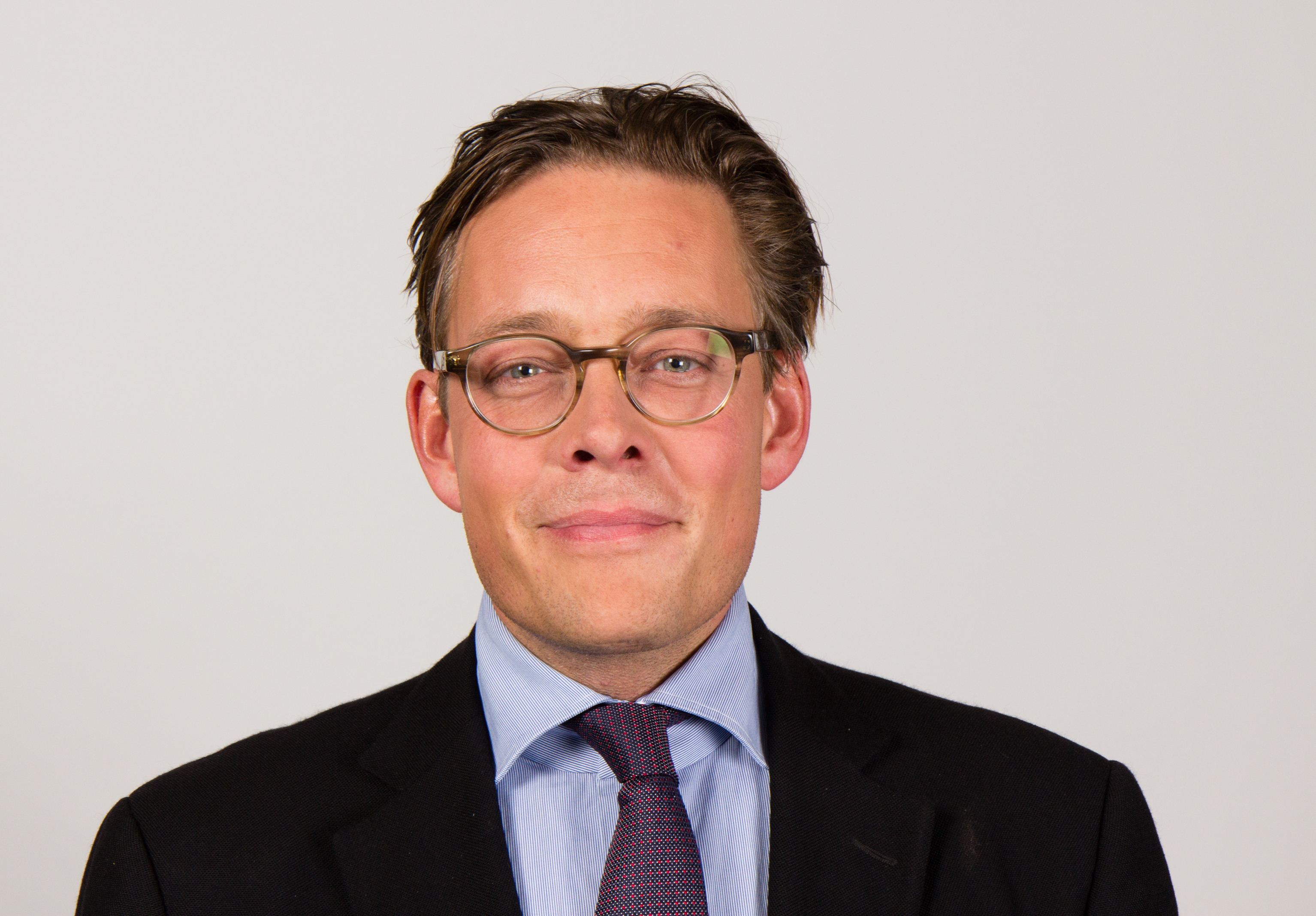 Konstantin von Notz * 21. Januar 1971 in Mölln) ist ein deutscher Jurist und Politiker (Bündnis 90/Die Grünen). Wikipedia-Bundestagsprojekt 2014 8–12 September 2014 in BerlinThis file was taken during the project “Wiki loves parliaments/Bundestag 2014” (German). Organisation: Martin Rulsch, Olaf KosinskyDesign: Martin KraftPhotography: Foto-AG Gymnasium Melle (Jan-Kristof Blömke, Lukas Eismann, Moritz Kosinsky, Laura Lessing, Karsten Mosebach, Mascha Mosebach, Teresa Schreer, Noah Sewöster, Niklas Tschöpe), Olaf Kosinsky, Martin Kraft, Harald Krichel, Steffen Prößdorf, Ralf Roletschek, Martin Rulsch, Gerd Seidel, Sven TeschkeVideo: Marc Rudnick, Manuel SchneiderEditors: Marcus Cyron, Günter Fremuth, Martin Kraft, Robin Krahl, Harald Krichel, Martin Rulsch, WikiAnikaReception: DasMonstaaa, Leonie Rabea Große, Lutheraner, Nina Möllering, Martin Rulsch, WikiAnika, Foto-AG Gymnasium MelleCosmetics: Regina Bosak, Bettina Dieguez, Sandra Kobbe, Andrea Strehlke; Irada Abdullayeva, Vivien Abelmann, Olena Engelbrecht, Sarah Fabini, Nina Magnus, Jacqueline Schmidt, Leonie Taboada, Julia Willer Usage information If you need more information how to use this file, please send an email to . Personality rights warningAlthough this work is freely licensed or in the public domain, the person(s) shown may have rights that legally restrict certain re-uses unless those depicted consent to such uses. In these cases, a model release or other evidence of consent could protect you from infringement claims.